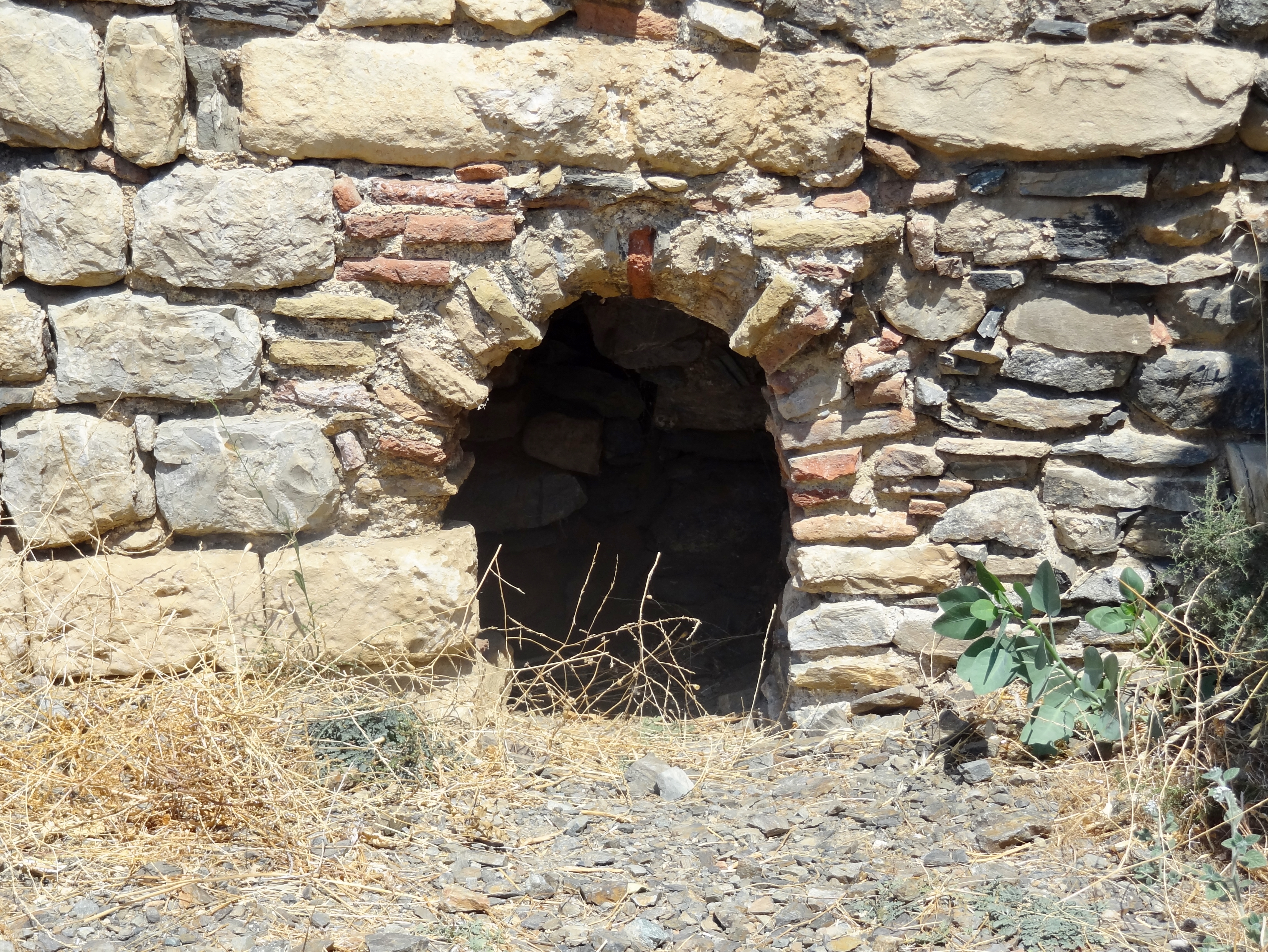 Reste des antiken Leben (Λεβήν) in Lendas, Gemeinde Gortyna, Regionalbezirk Iraklio, Kreta, Griechenland